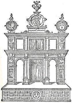 'Tooneel, opgericht bij het beroemde Antwerpsche landjuweel van 1561, ontleend aan 'Spelen van Sinne, ghespeelt op de Lant Juweel binnen Andtwerpen', gedrukt in 1562. Hier ziet men duidelijk hoe de middelopeningen, beneden en boven, door gordijnen afgesloten.